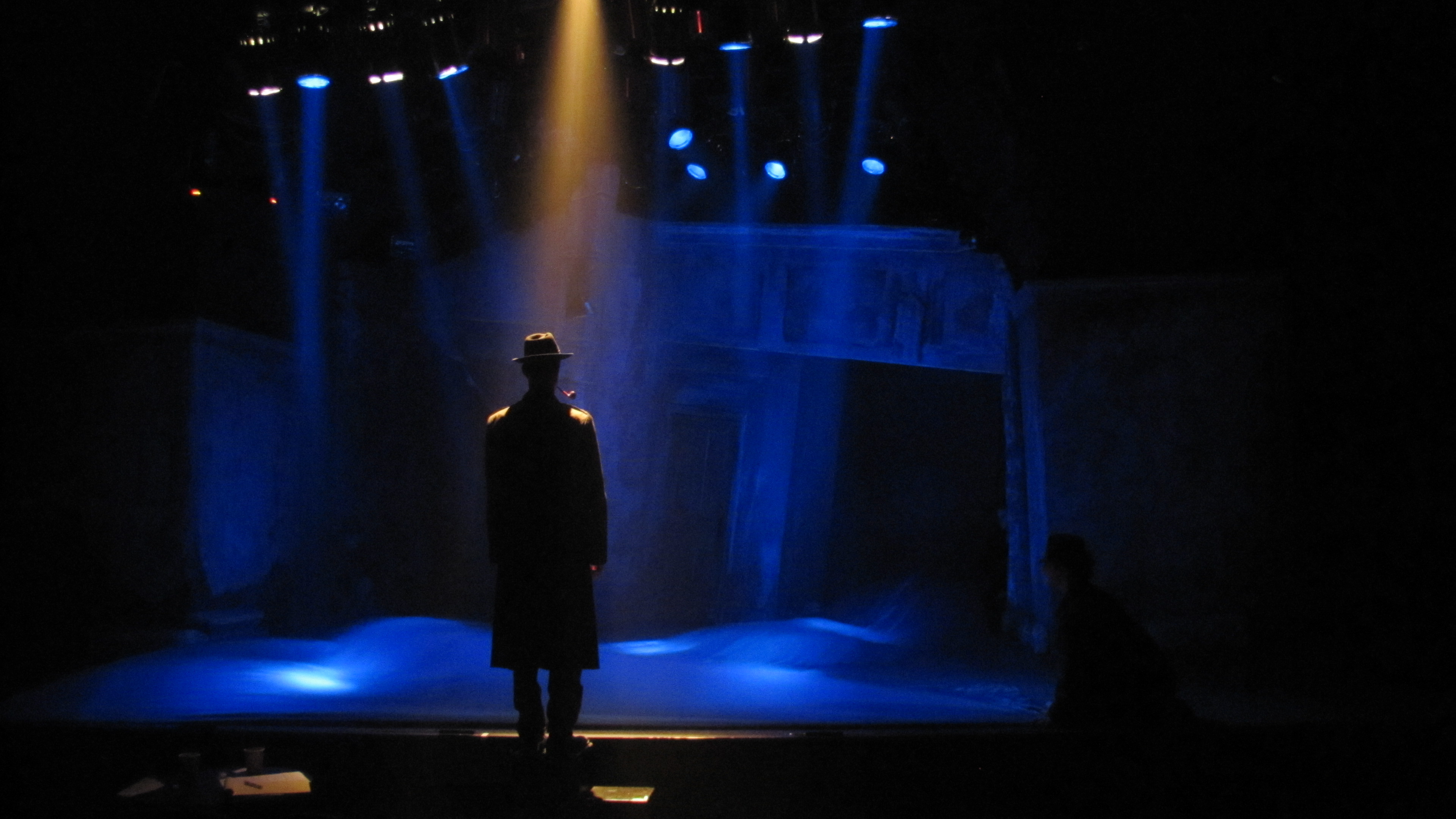 חוקר פרטי תיאטרון החאן בימוי מיכאל גורביץ צילום גדי דגון